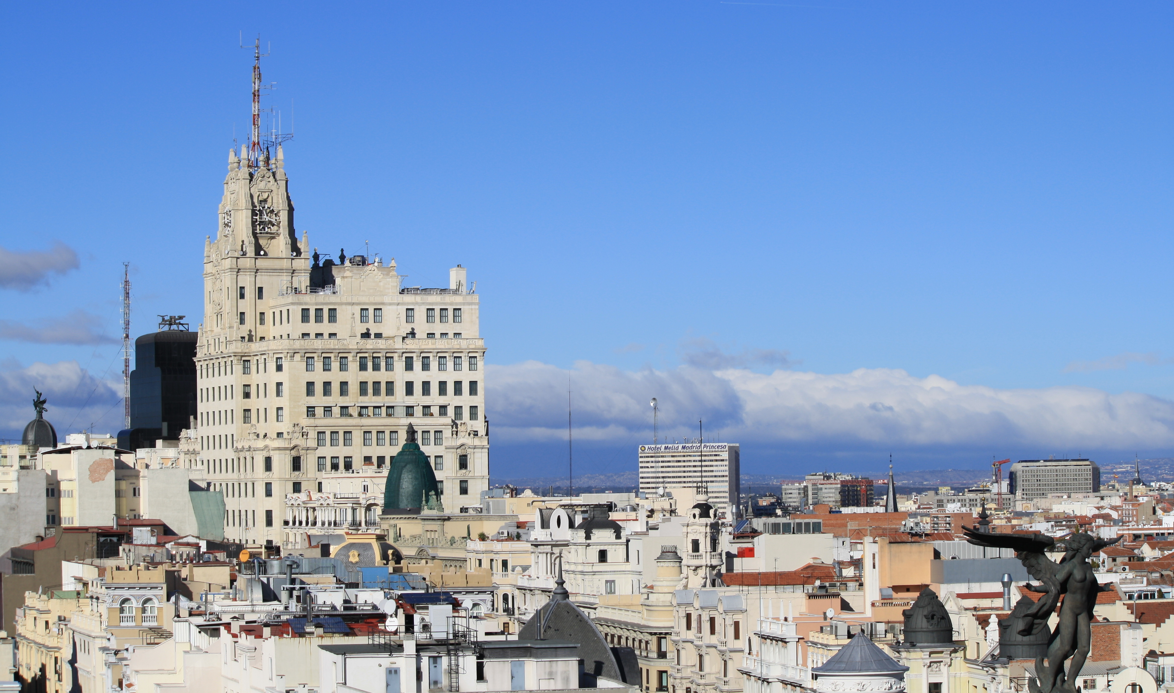 Edificio Telefónica, a la izquierda la escultura del Edificio Metrópolis Tomada desde la azotea del Círculo de Bellas Artes Madrid Comunidad de Madrid España